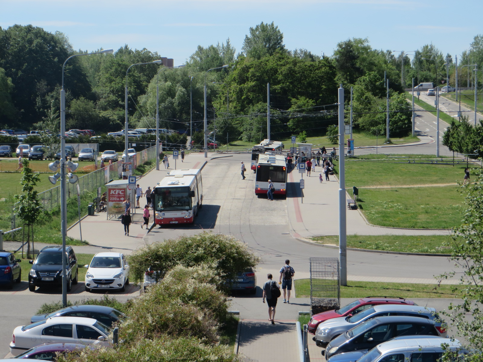 Zastávka IDS JMK Nemocnice Bohunice